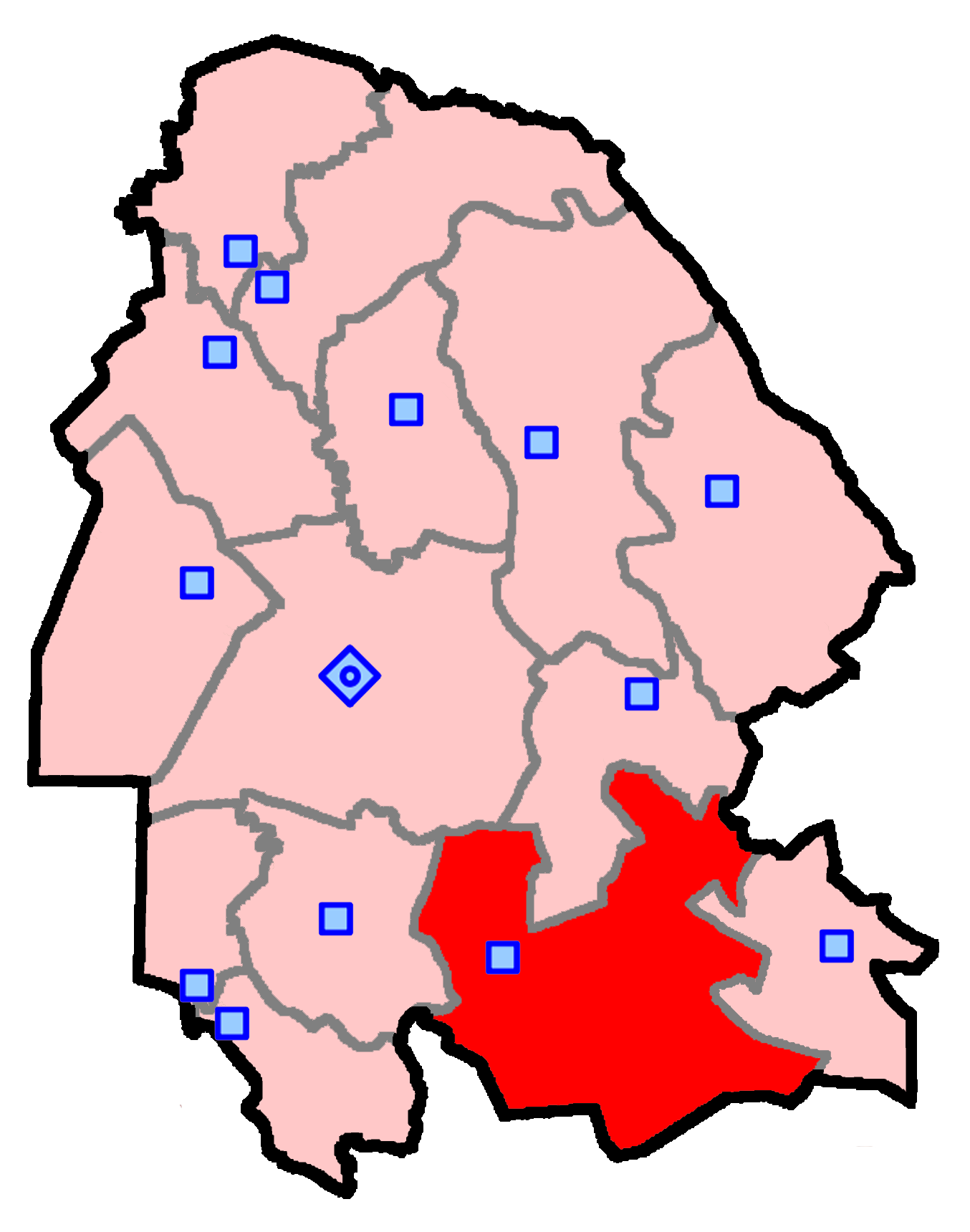 حوزهٔ انتخاباتی بندر ماهشهر و امیدیه و هندیجان برای انتخابات مجلس شورای اسلامی